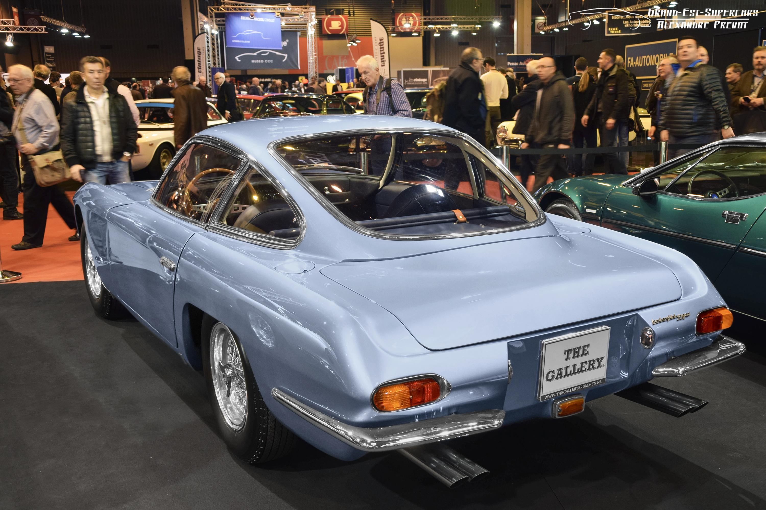 Année du modèle présenté : 1966